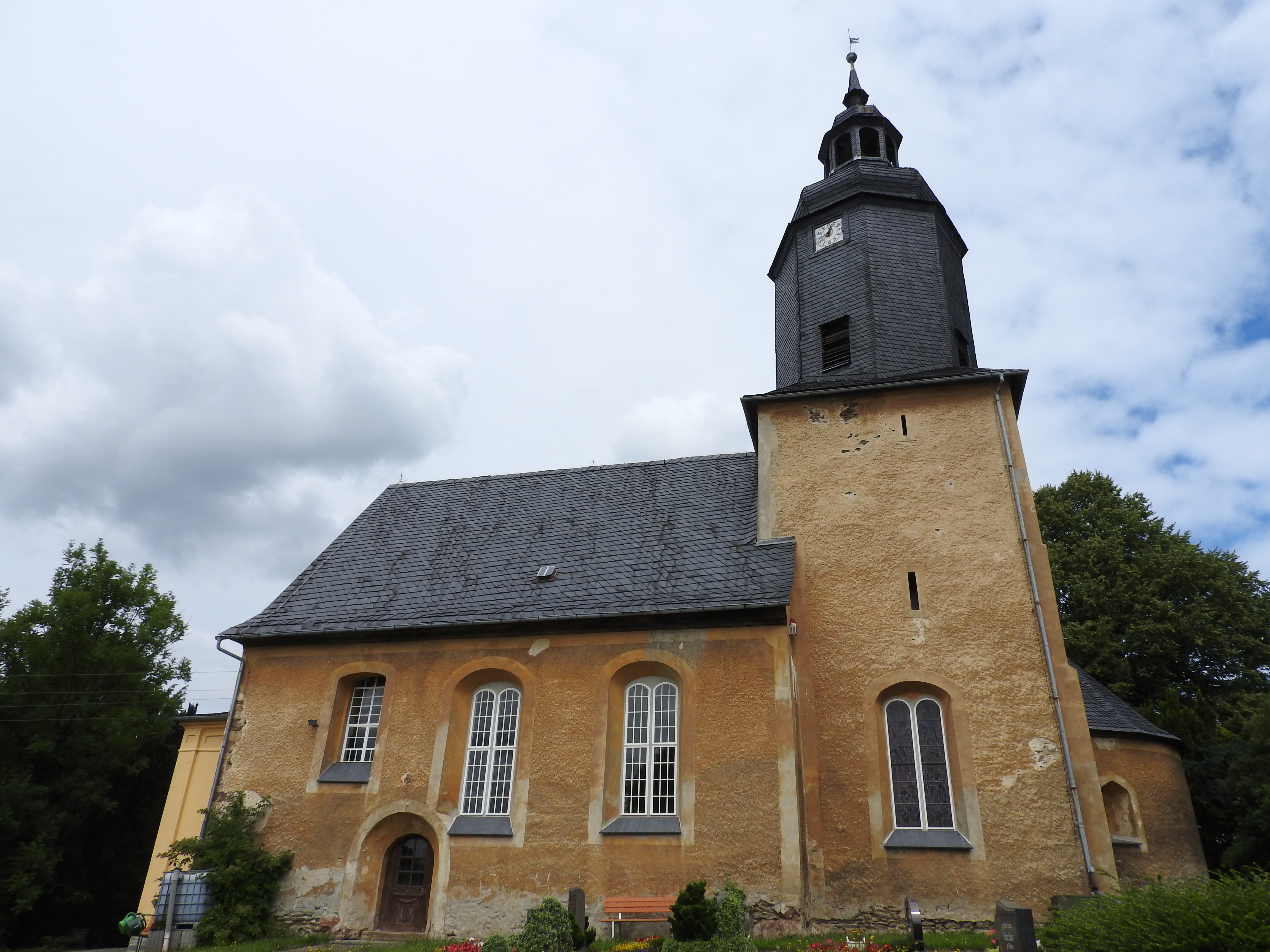 Kirche in Tschirma, Berga/Elster, Thüringen